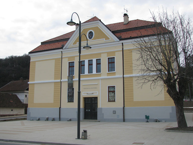 Centar za kulturu Pregrada